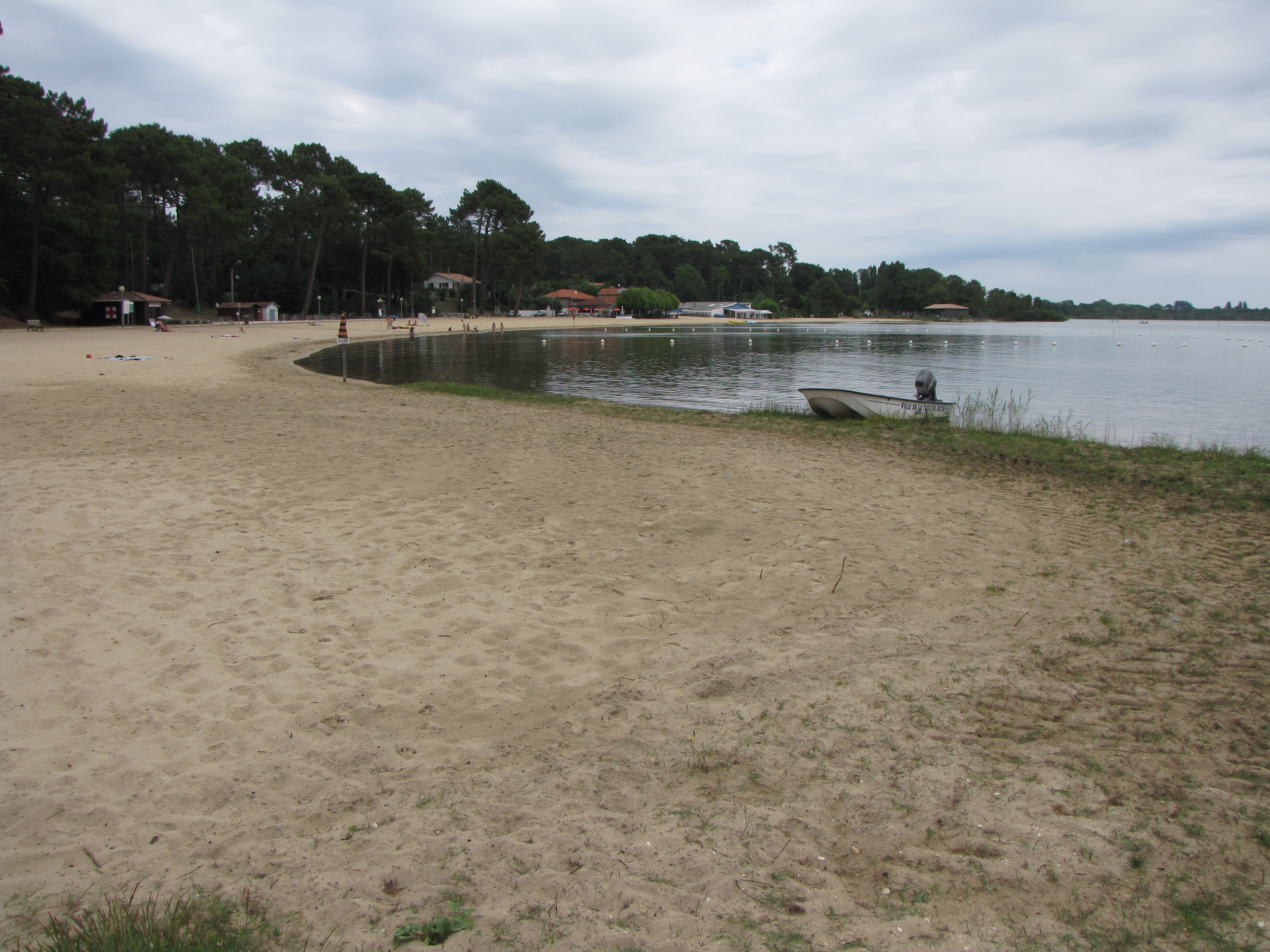 Étang de Lacanau